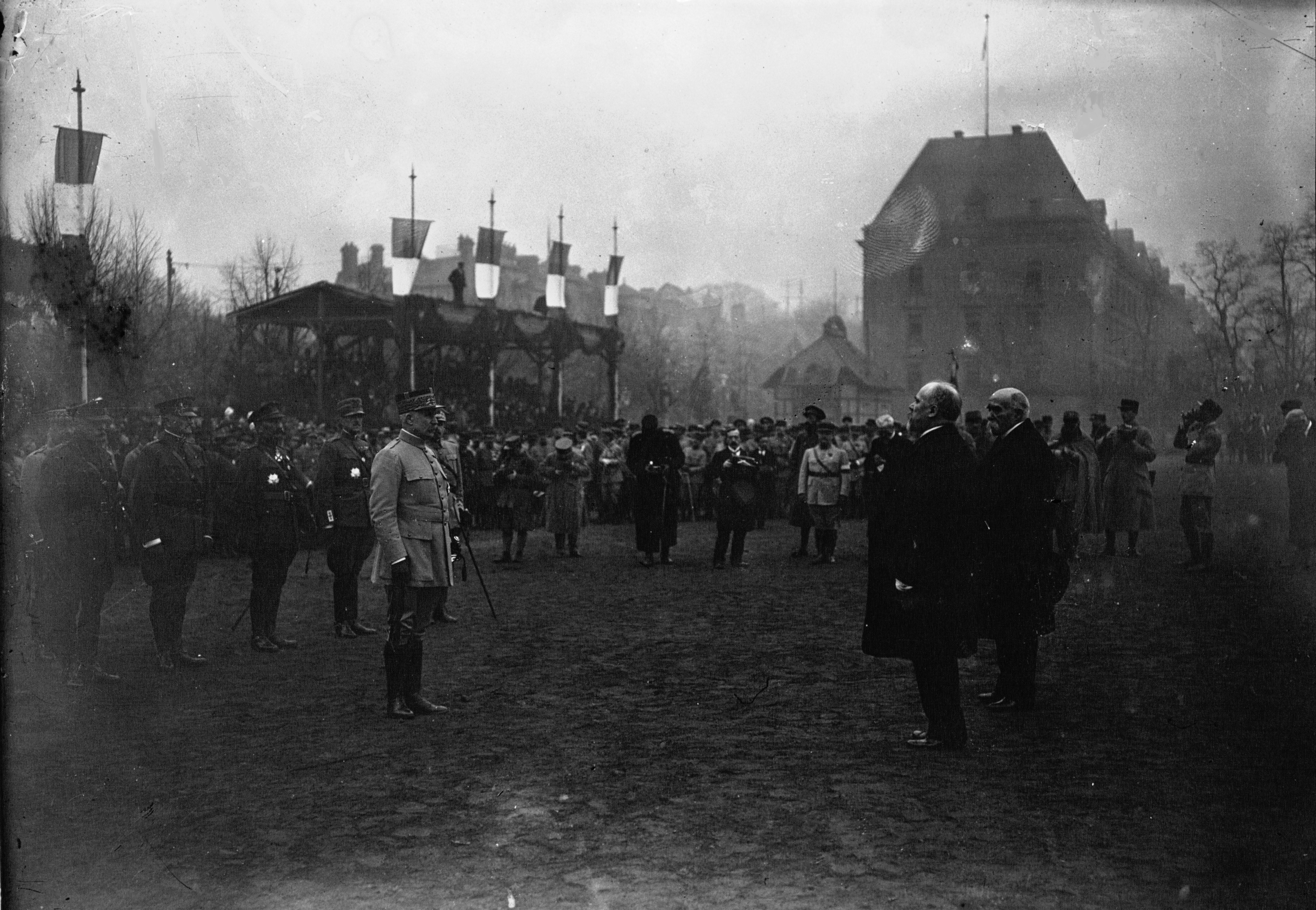 En présence de Georges Clemenceau, le président de République Raymond Poincaré remet le bâton de maréchal à Philippe Pétain (Metz, 8 décembre 1918). Derrière celui-ci, les maréchaux Joffre, Foch, sir Douglas Haig (Britannique) et les généraux Pershing (Américain), Gillian (Belge), Albricci (Italien) et Haller (Polonais).